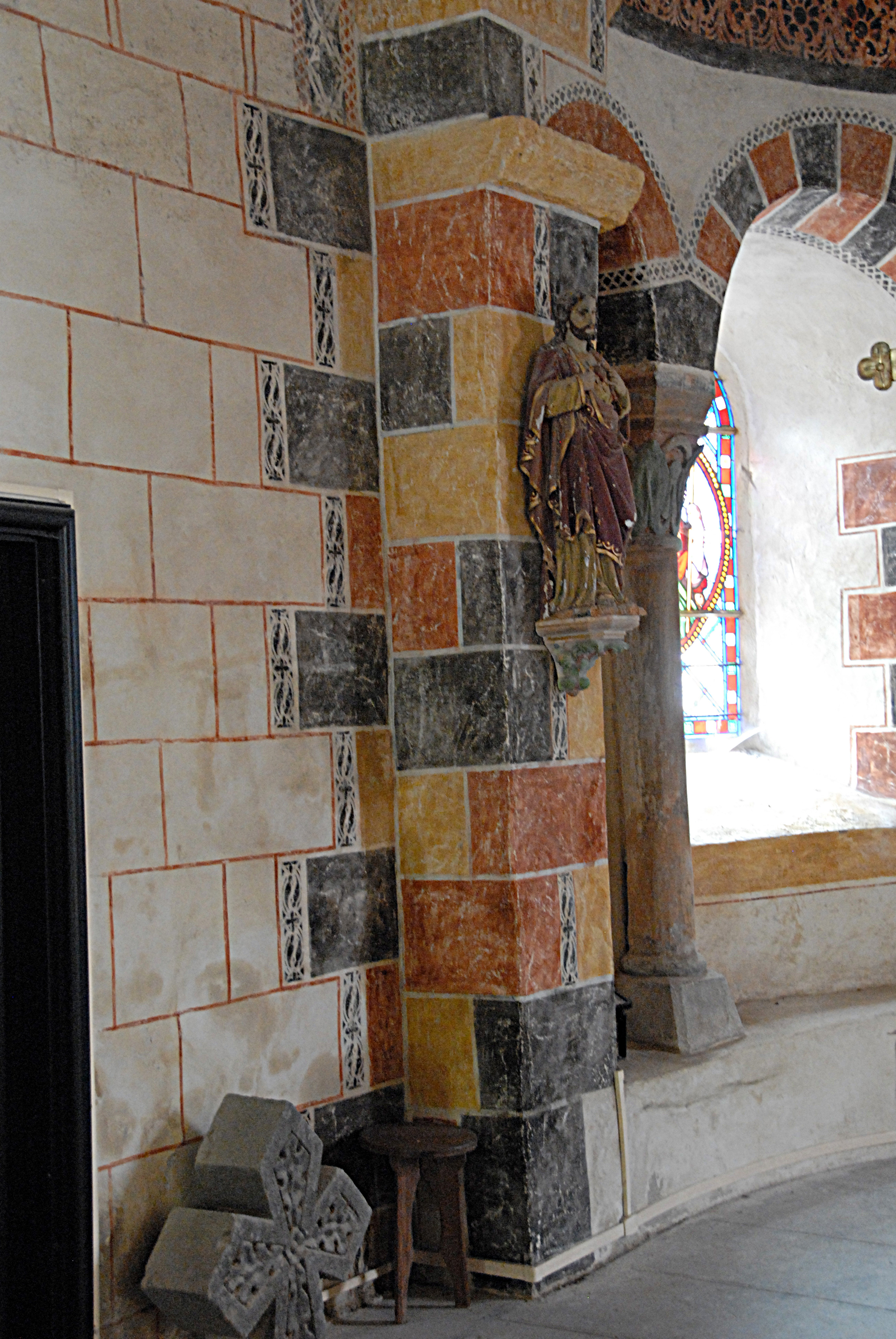 Dorfkirche Chambon-sur-Lac, Wandpfeiler im Chorjoch, Nordseite